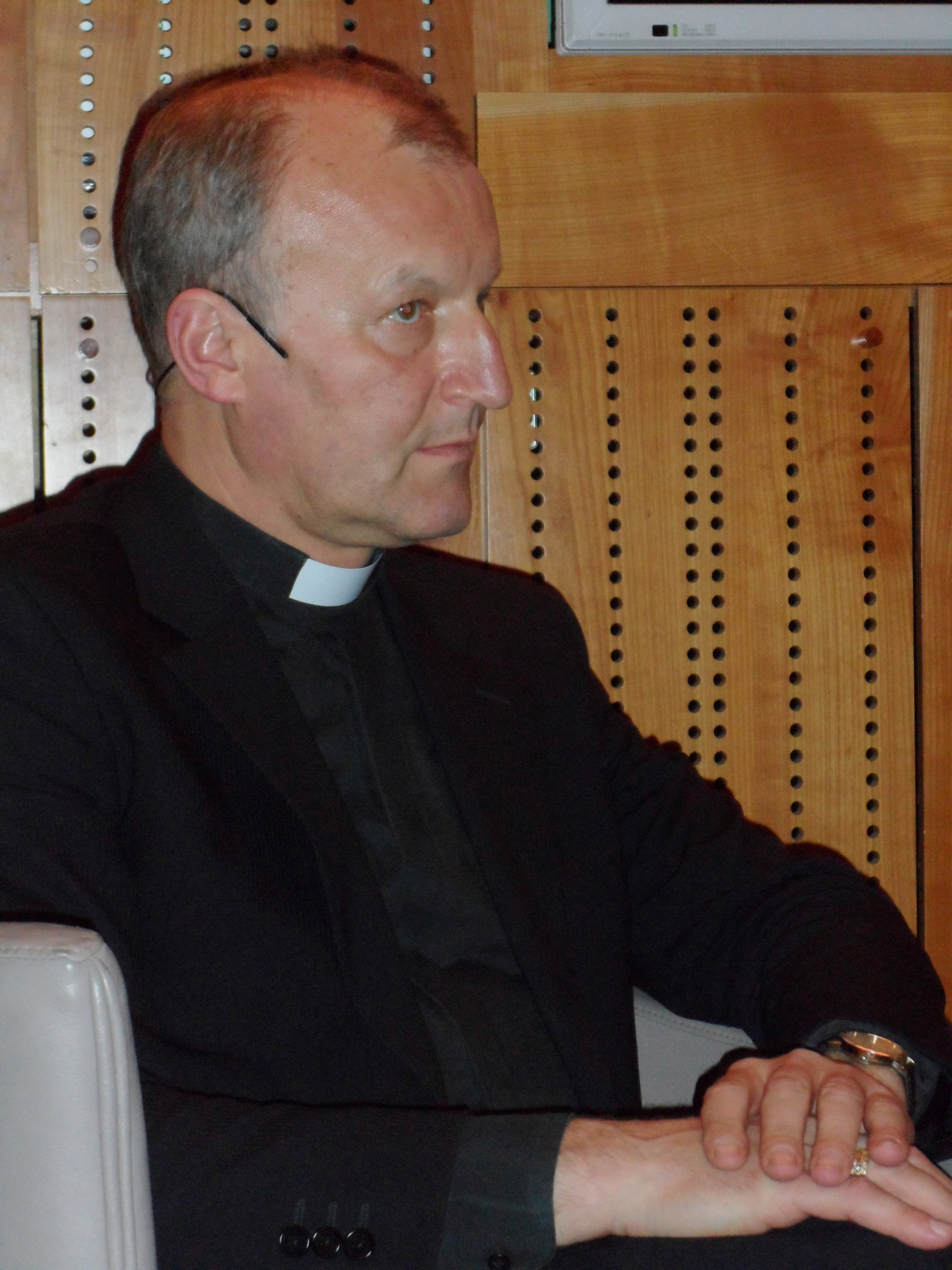 Anton Jamnik na Škrabčevi domačiji v Hrovači